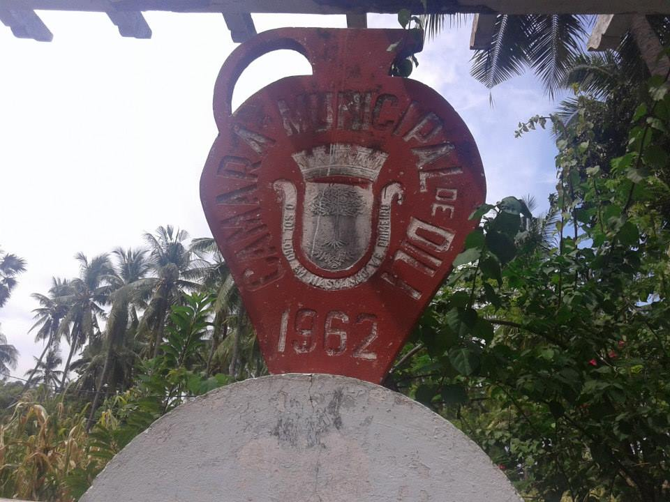 Atauro